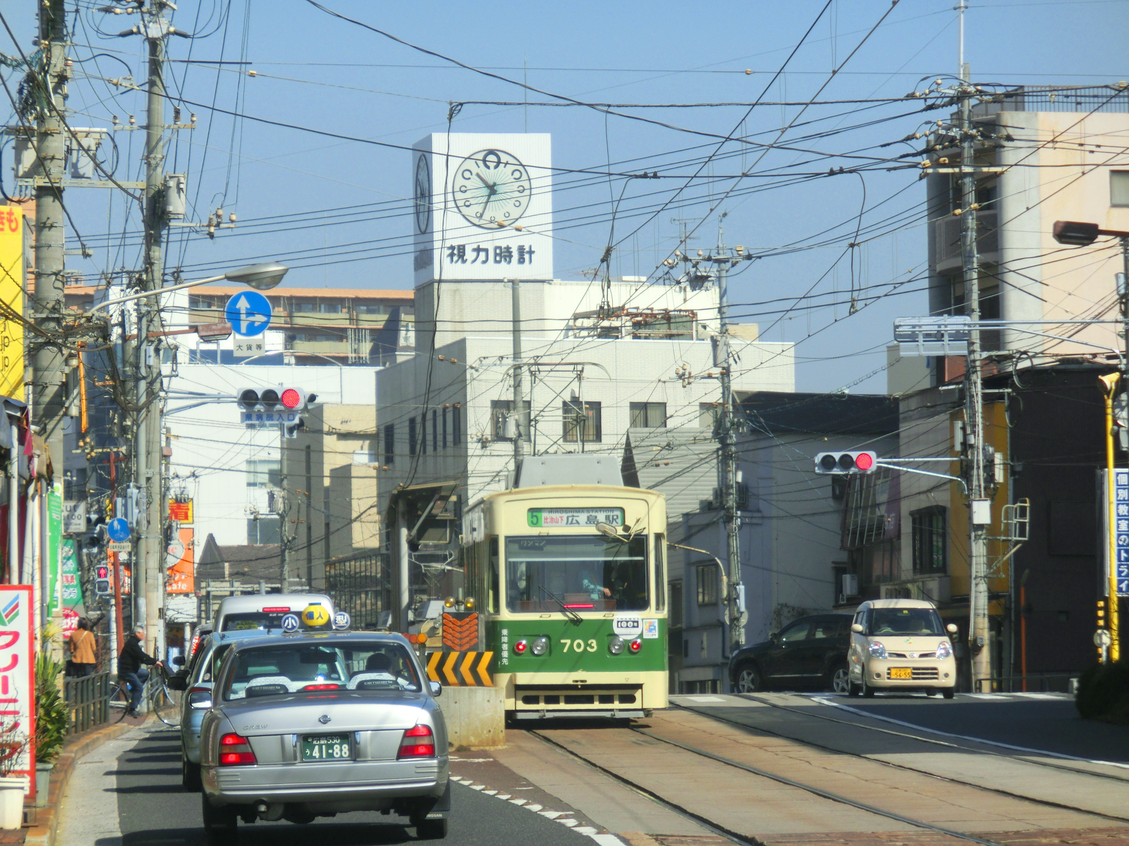 田中眼科 (+歯科) note